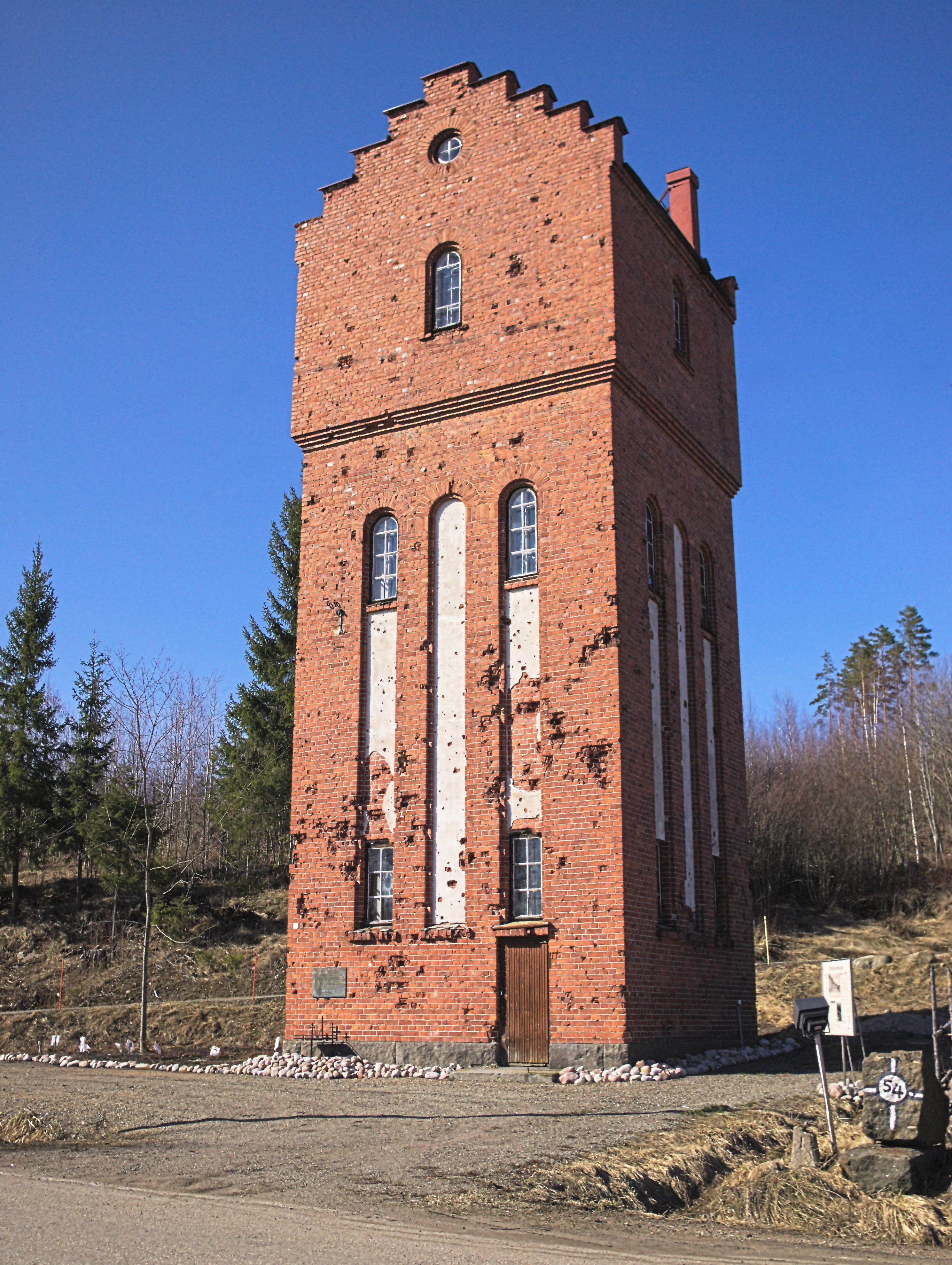 Veturien vesitorni Simolan rautatieasemalla. Jatkosodan aikana 19.–20. kesäkuuta 1944 Neuvostoliiton ilmavoimat pommitti kolmeen otteeseen Simolan rautatieasemaa ja Etu-Simolan pysäkkiä. Pommituksessa kuoli ainakin 142 ihmistä, heistä noin puolet oli siviilejä ja loput sotilaita, virkailijoita ja neuvostoliittolaisia sotavankeja. 15 taloa paloi ja 23 vaurioitui. Pommituksen jäljet näkyvät yhä vesitornissa, joka on säilytetty uhrien muistomerkkinä.